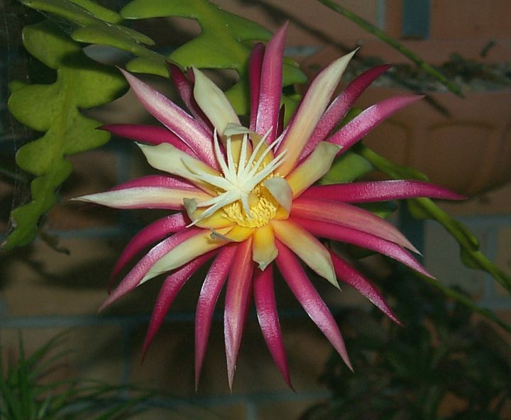 Selenicereus antonyanus